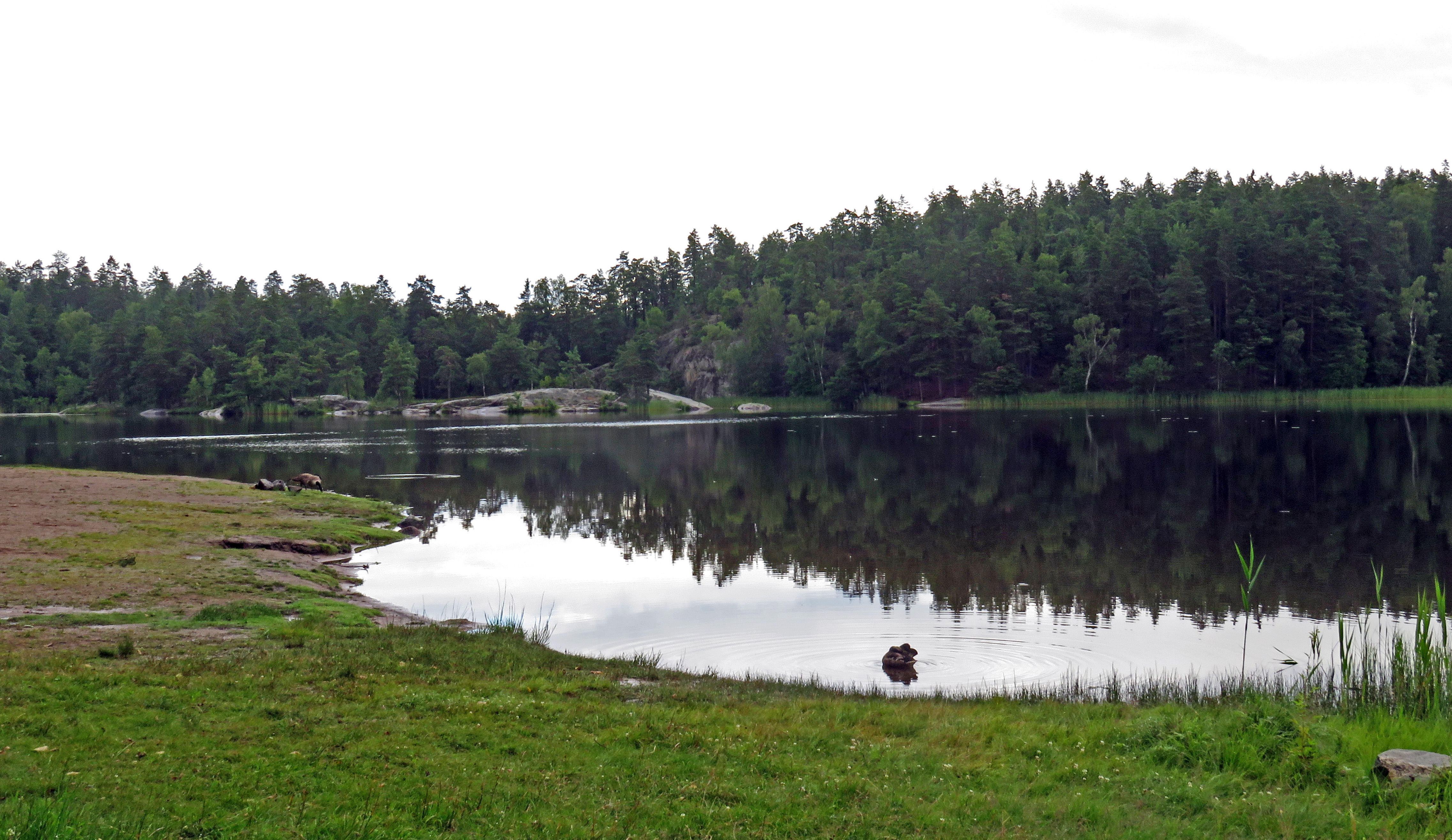 Ramsjön